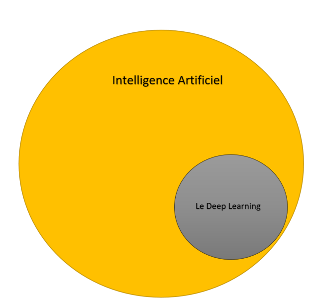 Le Deep Learning est un sous-ensemble de l'Intelligence Artificielle